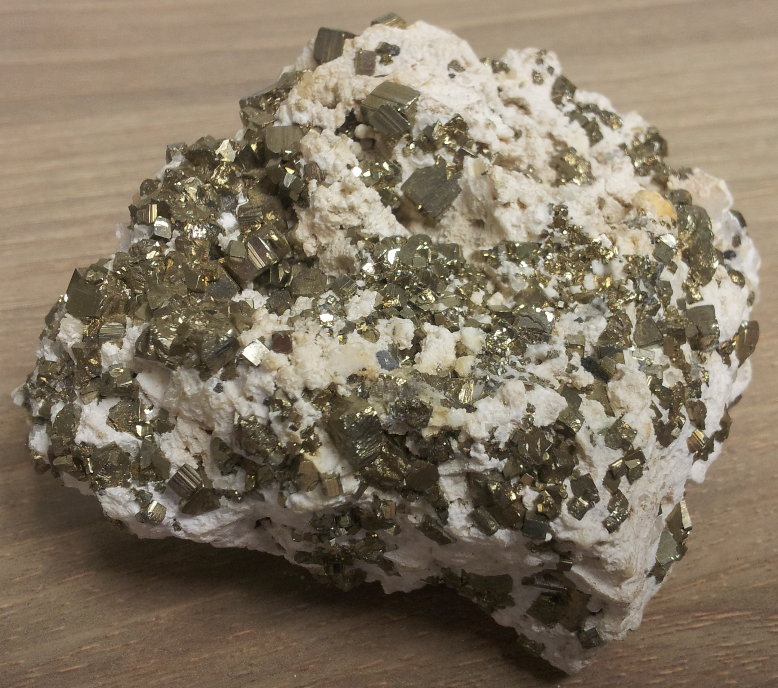 פיריט